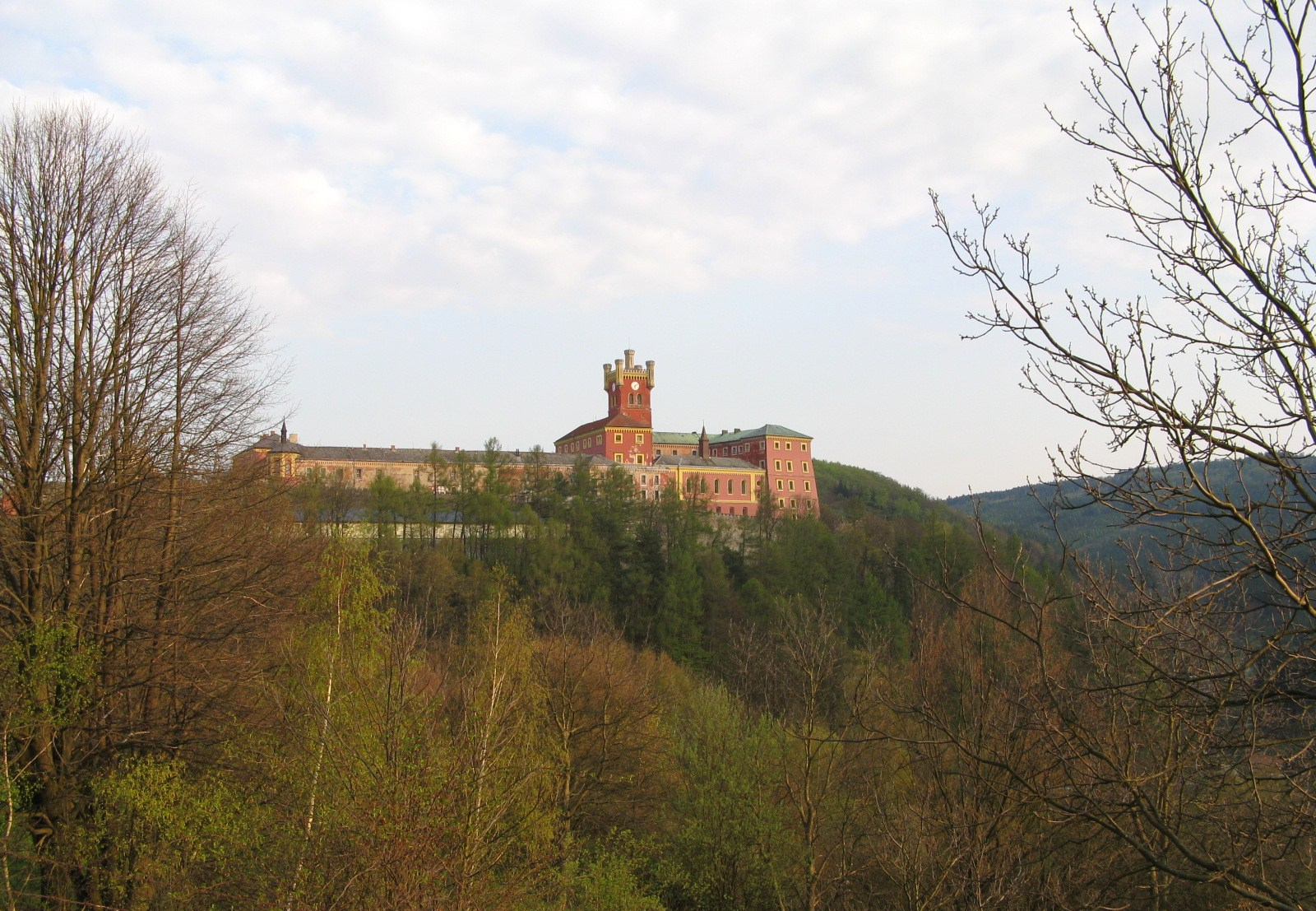 Hrad Mírov-pohled od Z